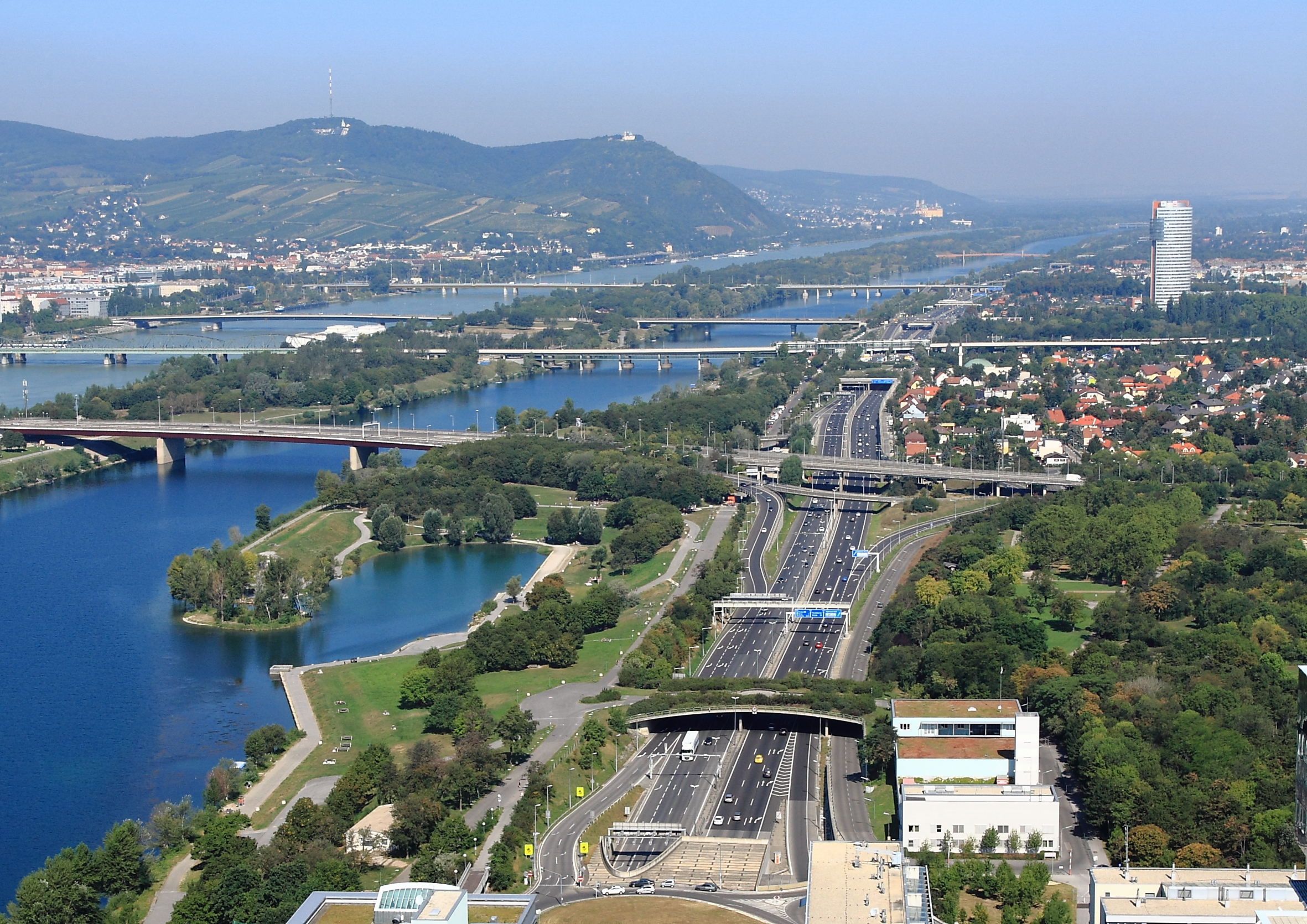 Die Donauufer Autobahn im Bereich zwischen Kaisermühlen und Floridsdorf. Am unteren Bildrand das Nordportal des Kaisermühlentunnels. Die Donaubrücken (von vorn nach hinten): Brigittenauer Brücke, Nordbahnbrücke beziehungsweise Georg-Danzer-Steg, Floridsdorfer Brücke, Nordbrücke. Im Bildhintergrund (von links nach rechts): Kahlenberg mit dem Sender Kahlenberg, Leopoldsberg mit der Leopoldsbergkirche, Klosterneuburg mit dem Stift Klosterneuburg und das Hochhaus Florido Tower.